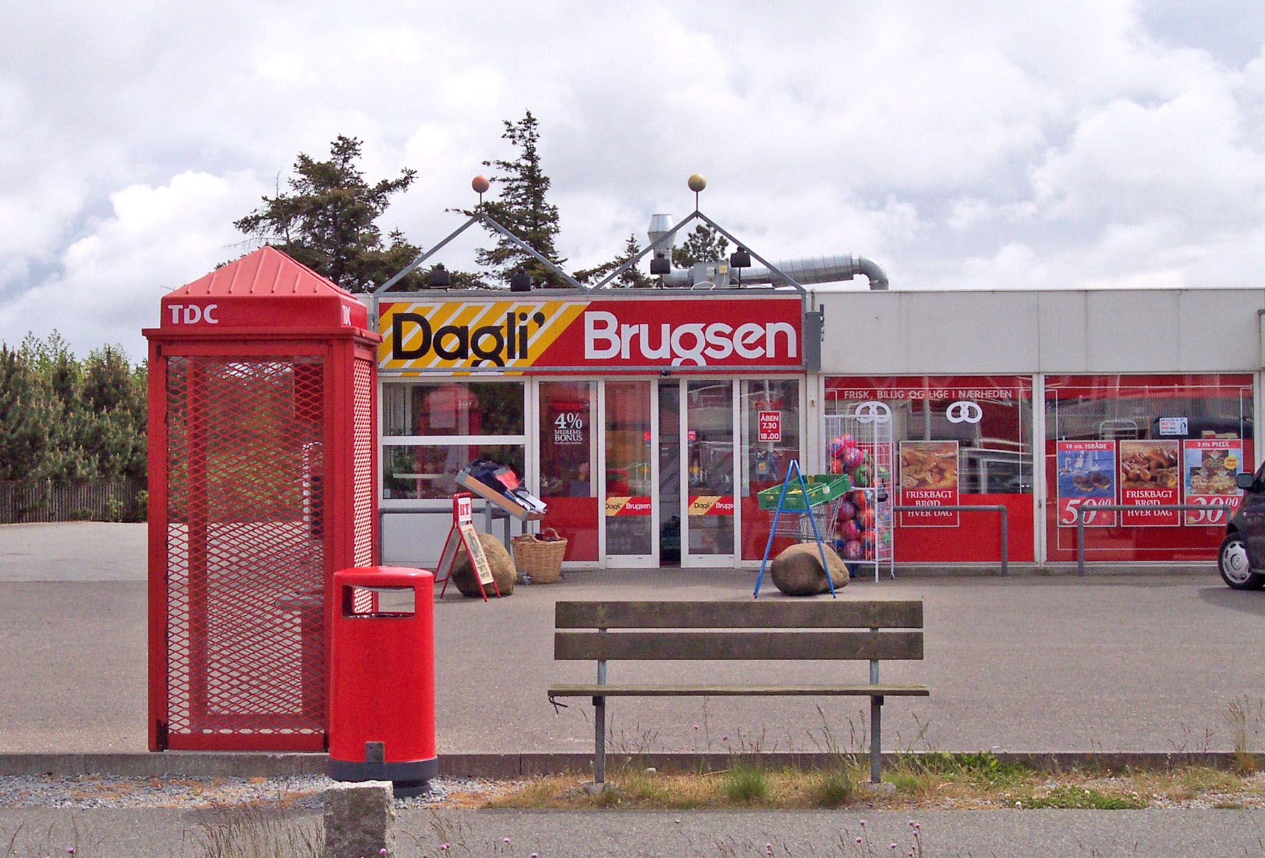 Brugsen Supermarket in Blåvand, Denmark ( closed ~2008 )